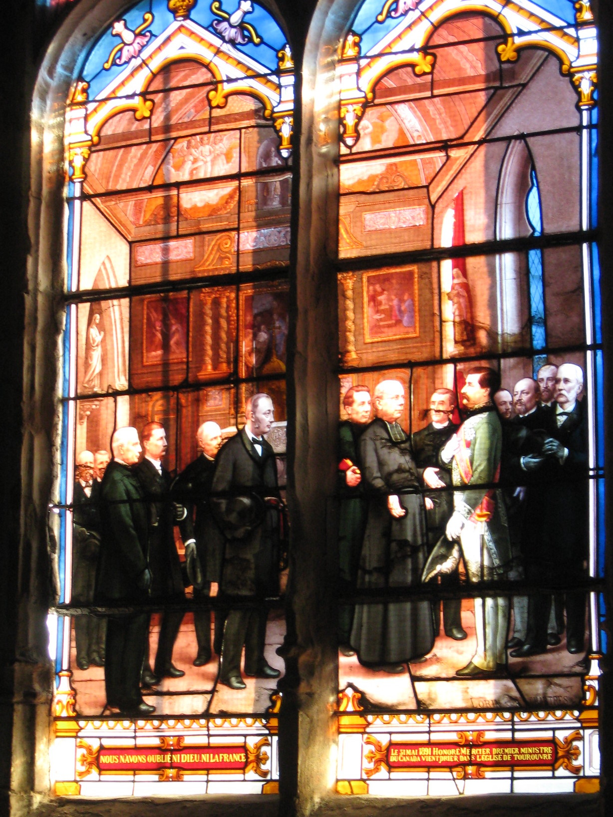 Vitrail relatant la visite à Tourouvre du Premier ministre québecois, 1893. Signature "Lorin Chartres".